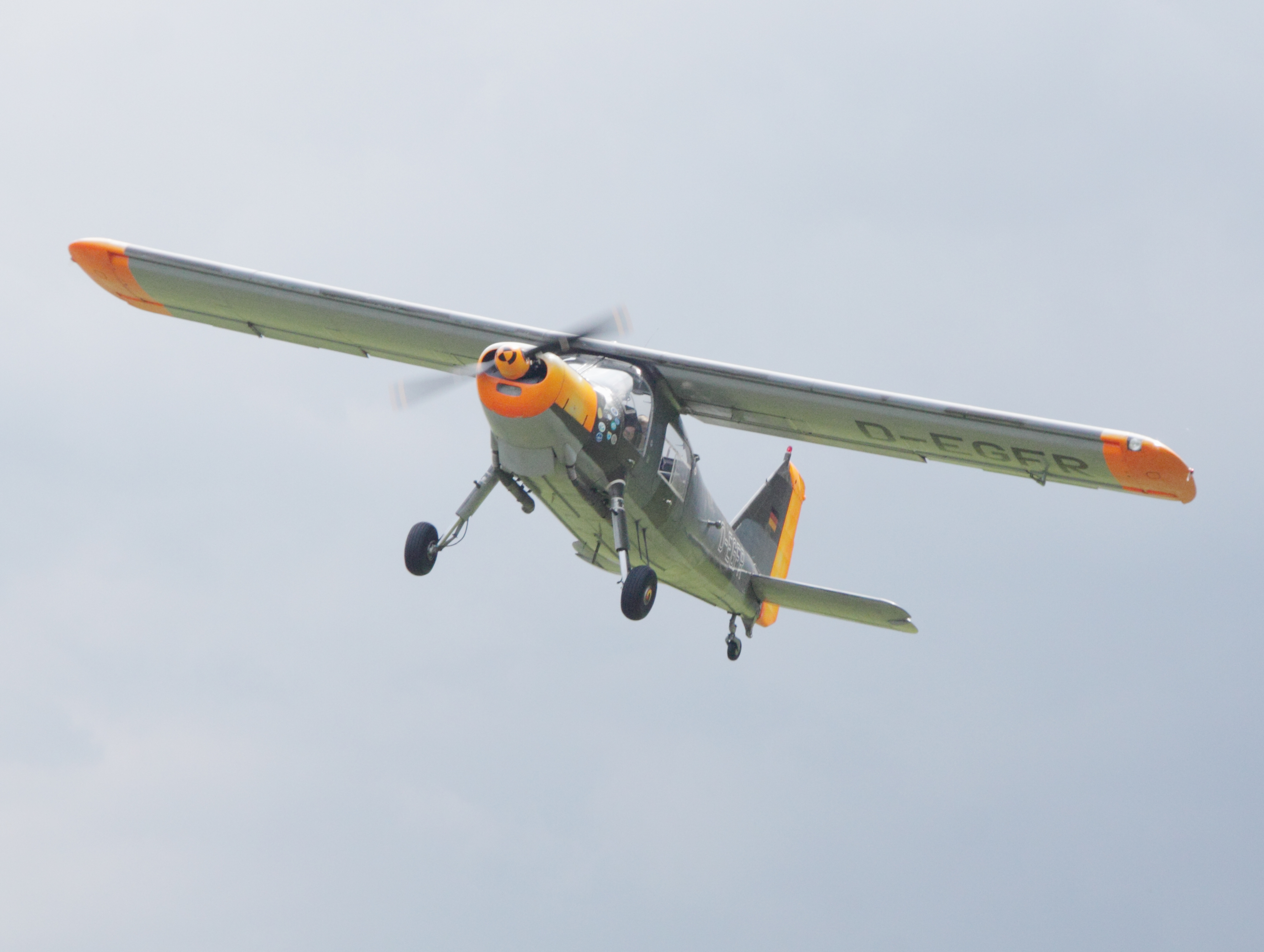 Fotoflug Waren (Müritz) und Umgebung: Flugzeug D-EGFR/Dornier Do 27